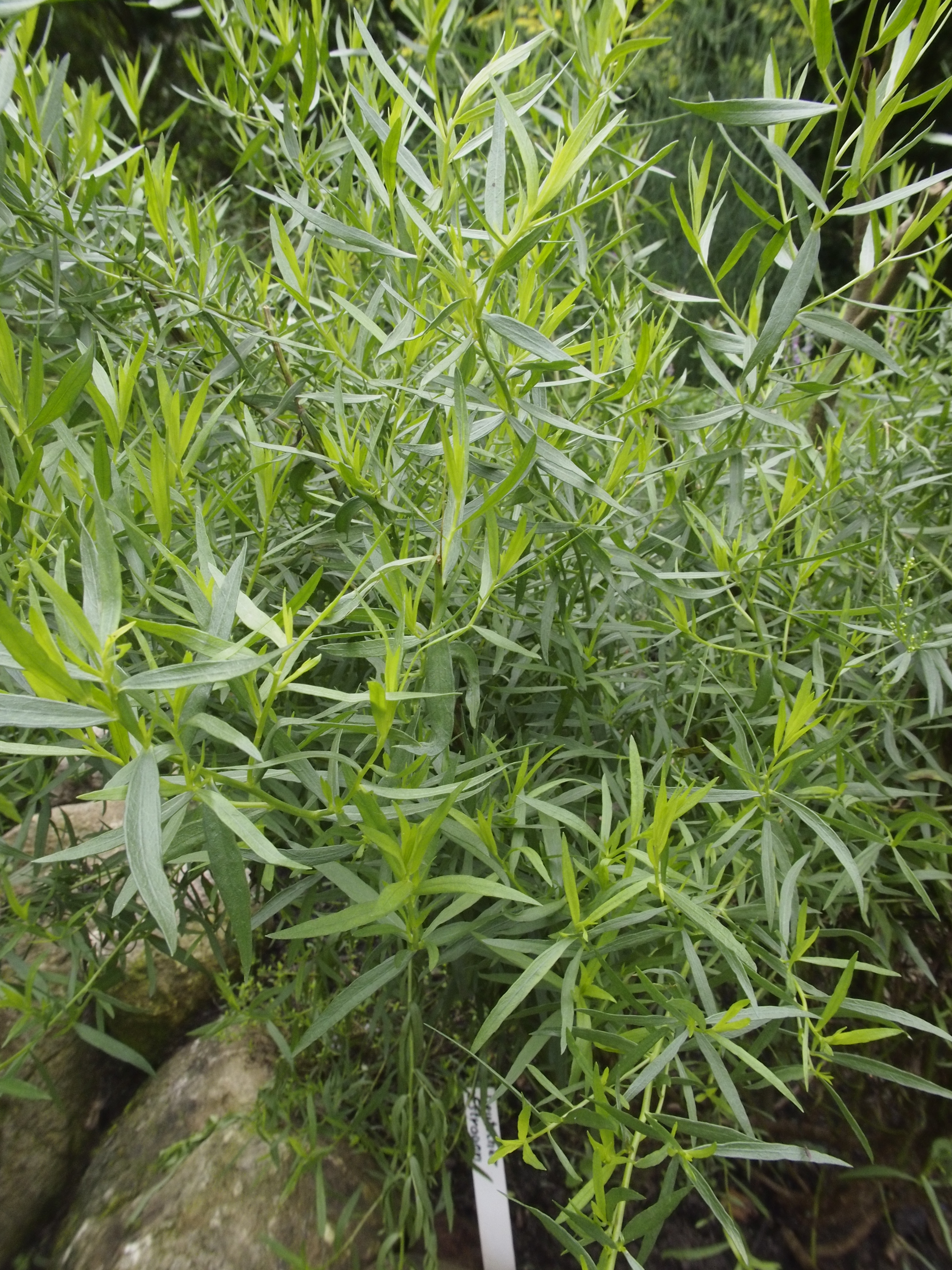 Deutscher Estragon (Artemisia dracunculus) - Südheide, Germany